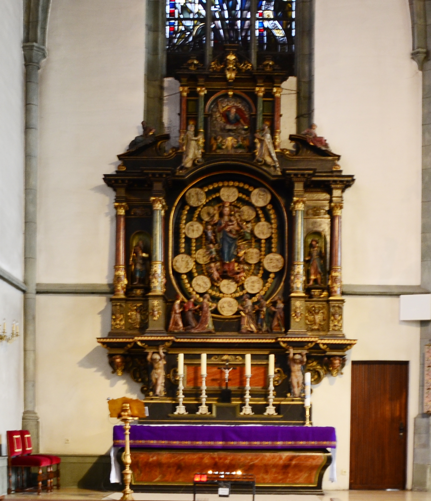 denkmalgeschützte Propsteikirche, der Rosenkranzaltar